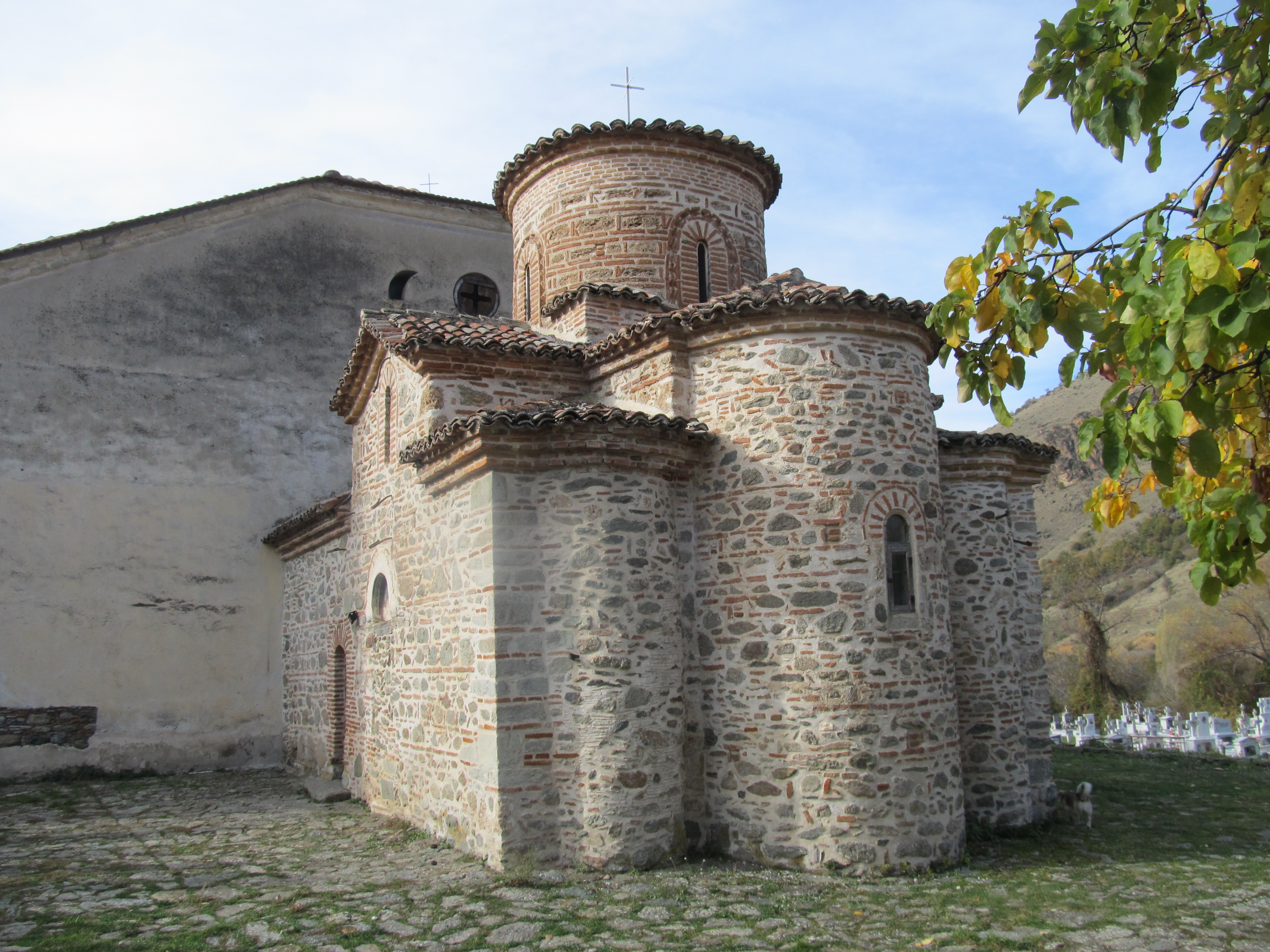 Средновековната църква "Свети Герман" в село Герман, Северна Гърция